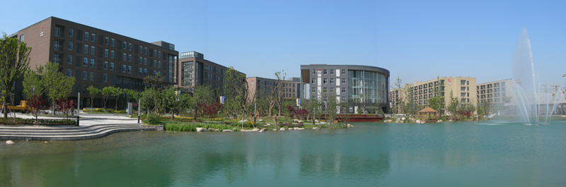 无锡国家软件园